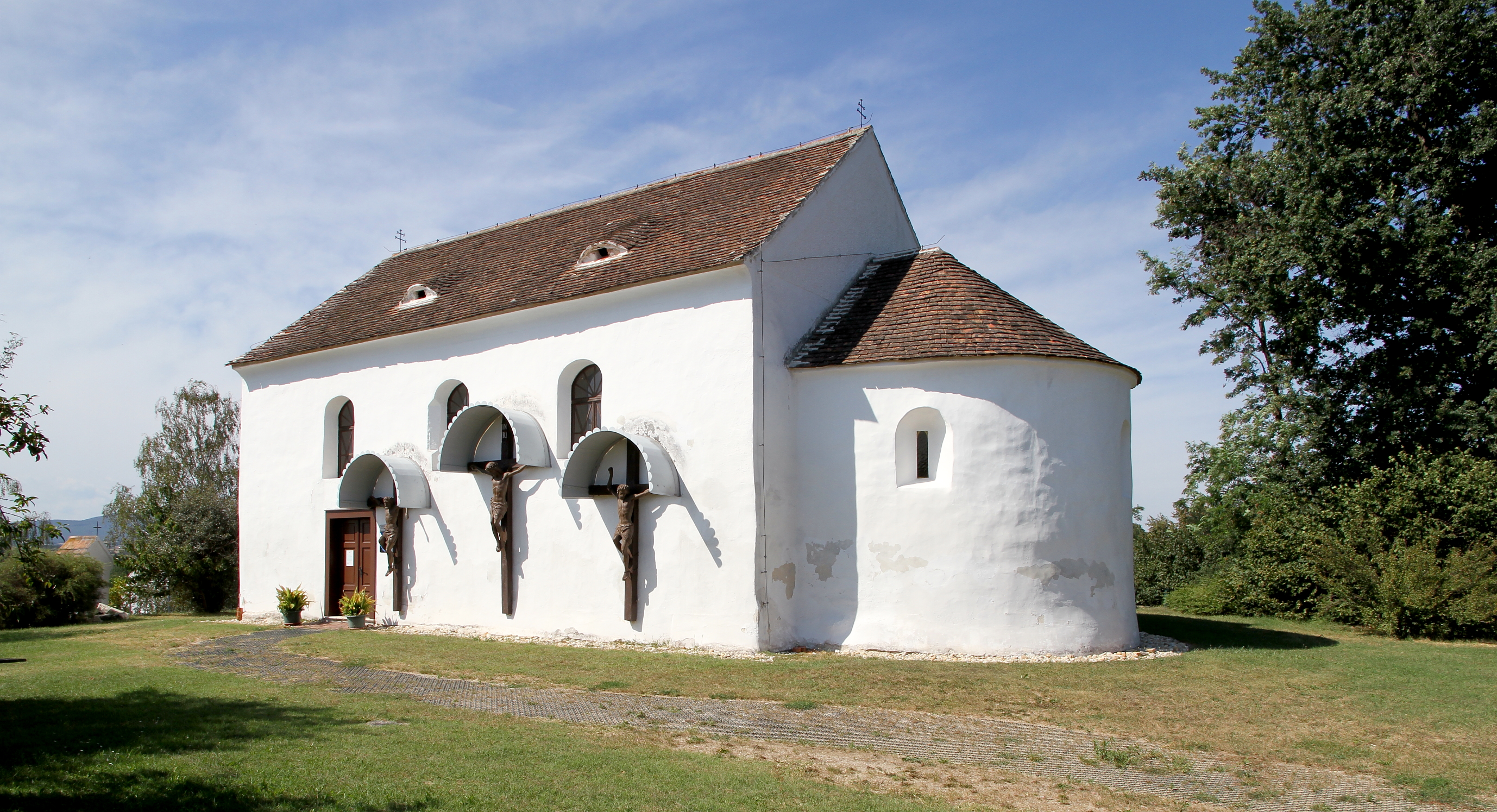 Die röm.-kath. Bergkirche von Stoob. Ein romanischer Rechteckbau aus dem 13. Jahrhundert mit eingezogener Halbkreisapsis, in der Wandmalereireste aus den Jahren um 1220/1230 freigelegt wurden, die Christus und die 12 Apostel darstellen. An der südlichen Außenwand befindet sich eine Kreuzigungsgruppe (Gekreuzigter und die zwei Schächer) aus Holz; eine Grödentaler Holzschnitzarbeit aus dem Jahr 1891. 1954 plaques for cultural property protected by the Hague Convention in Austria